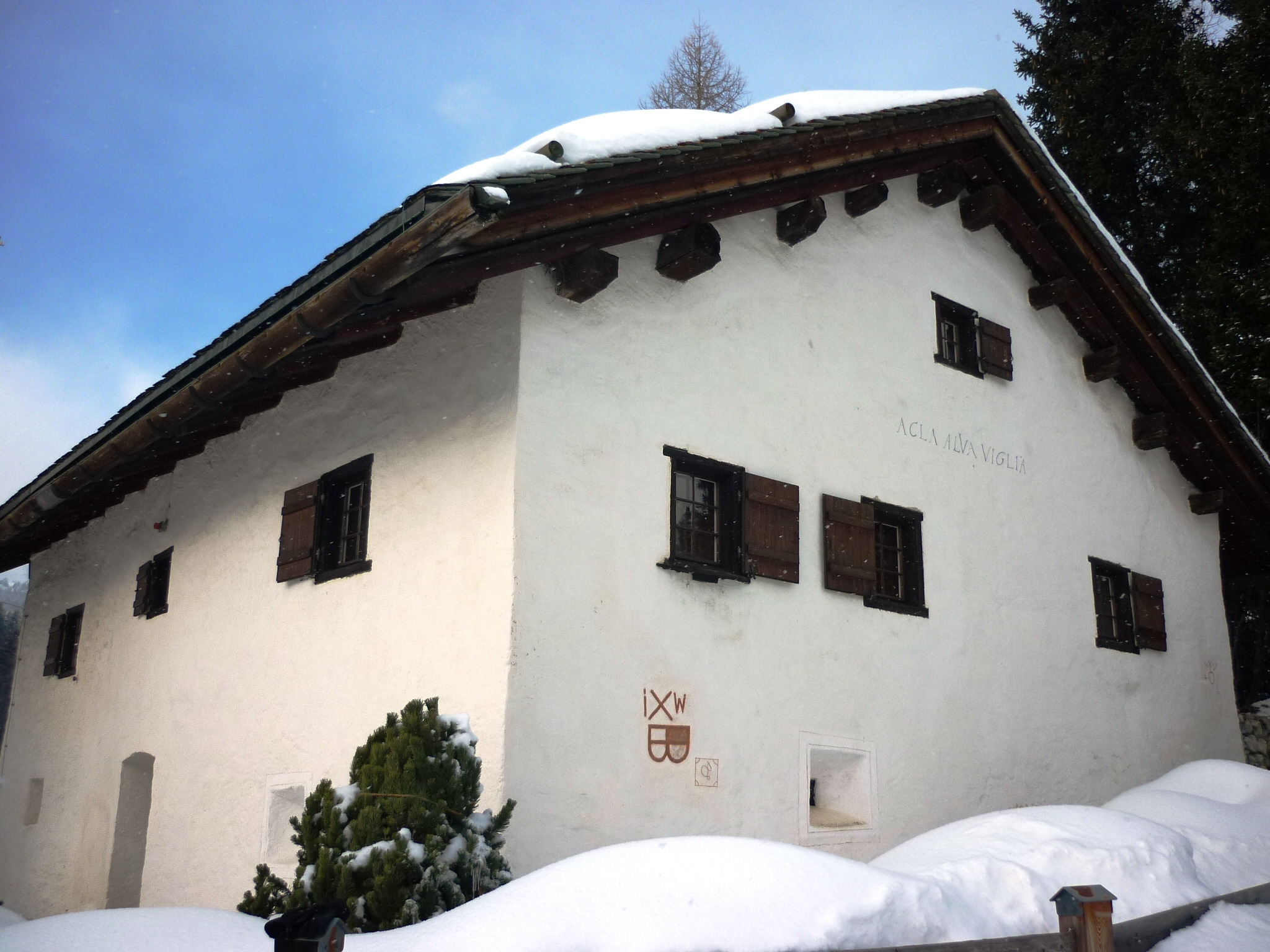 Acla Alva Viglia, Valbella GR, Schweiz